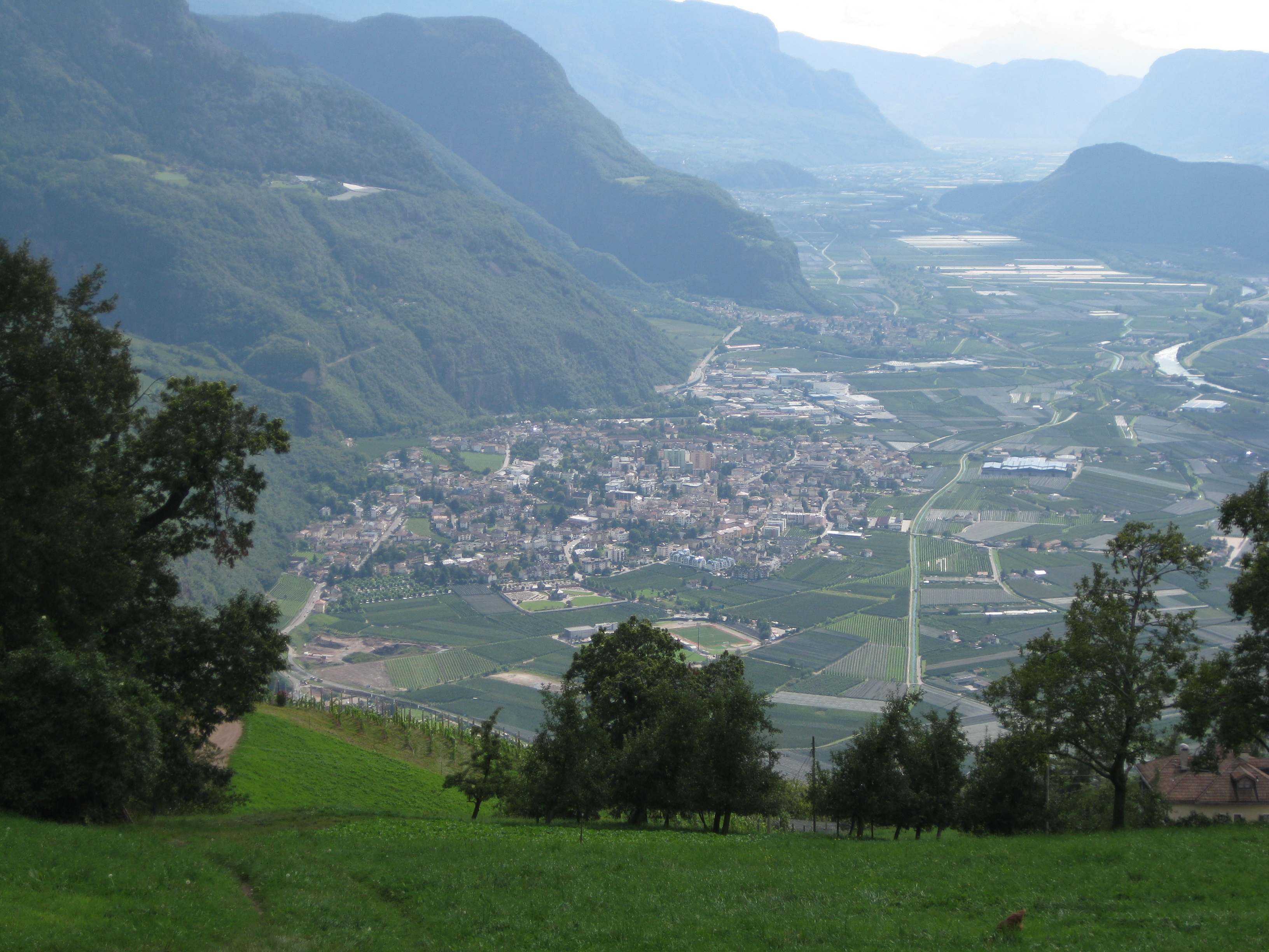 Blick auf Leifers in Südtirol von Seit aus